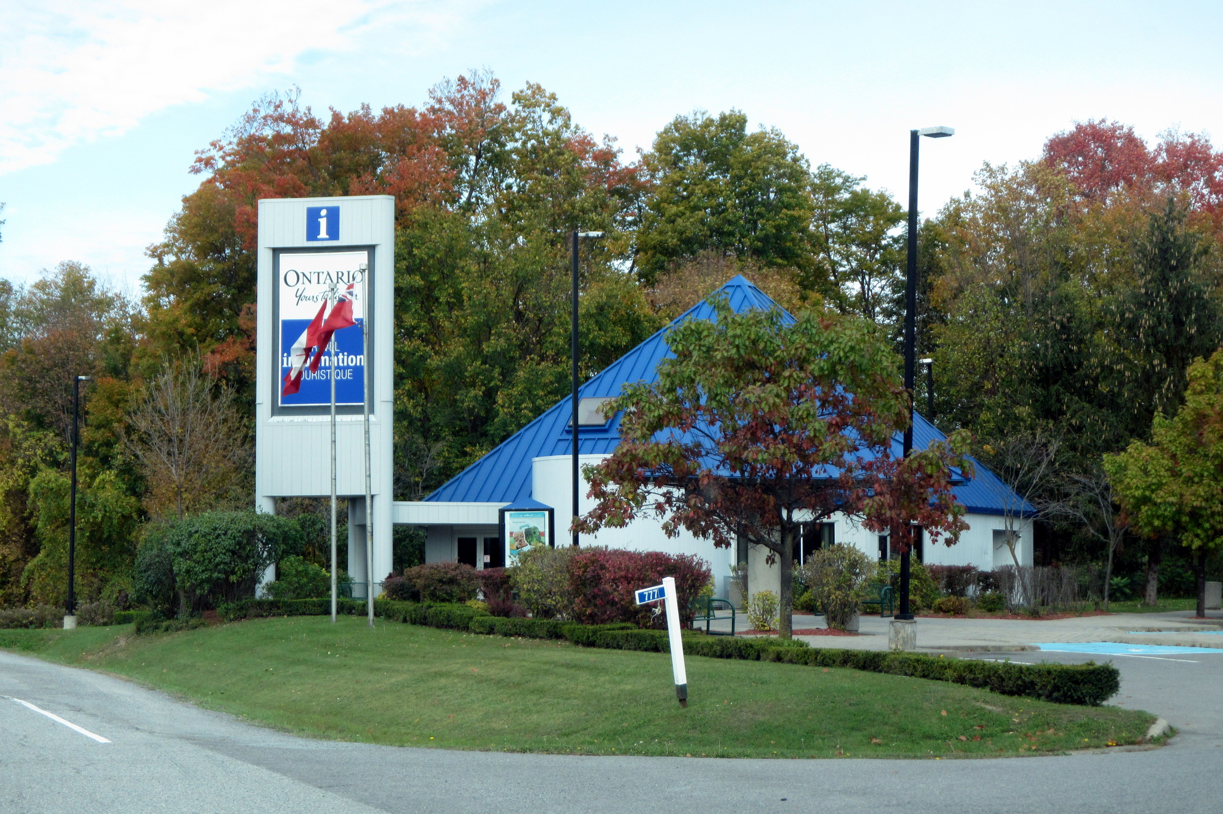 Ontario Travel Information Centre - Centre d'information touristique de l'Ontario